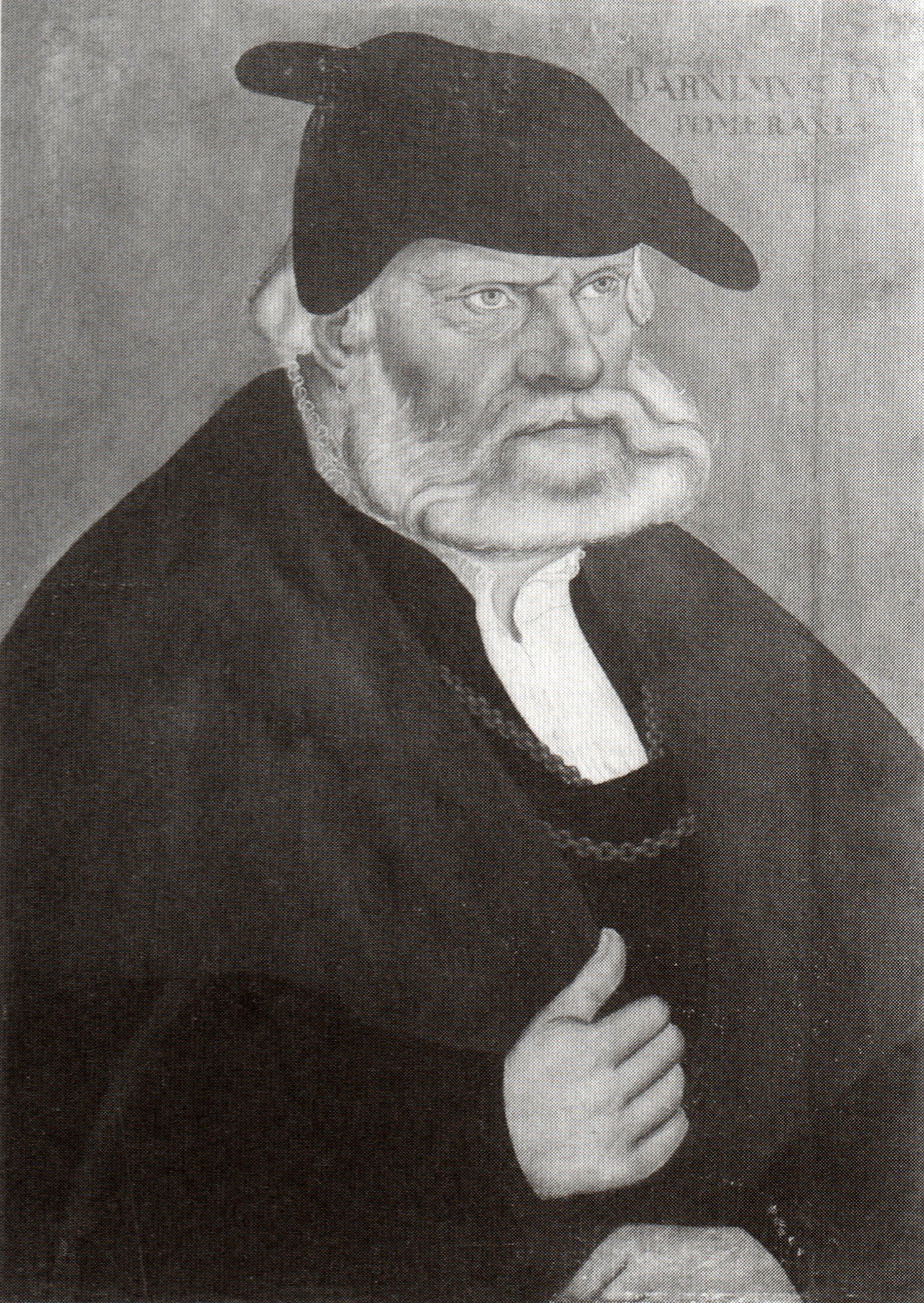 Ölgemälde von Herzog Barnim IX. Pommern-Stettin. Inschrift: BARNIMUS DUX POMERANIAE